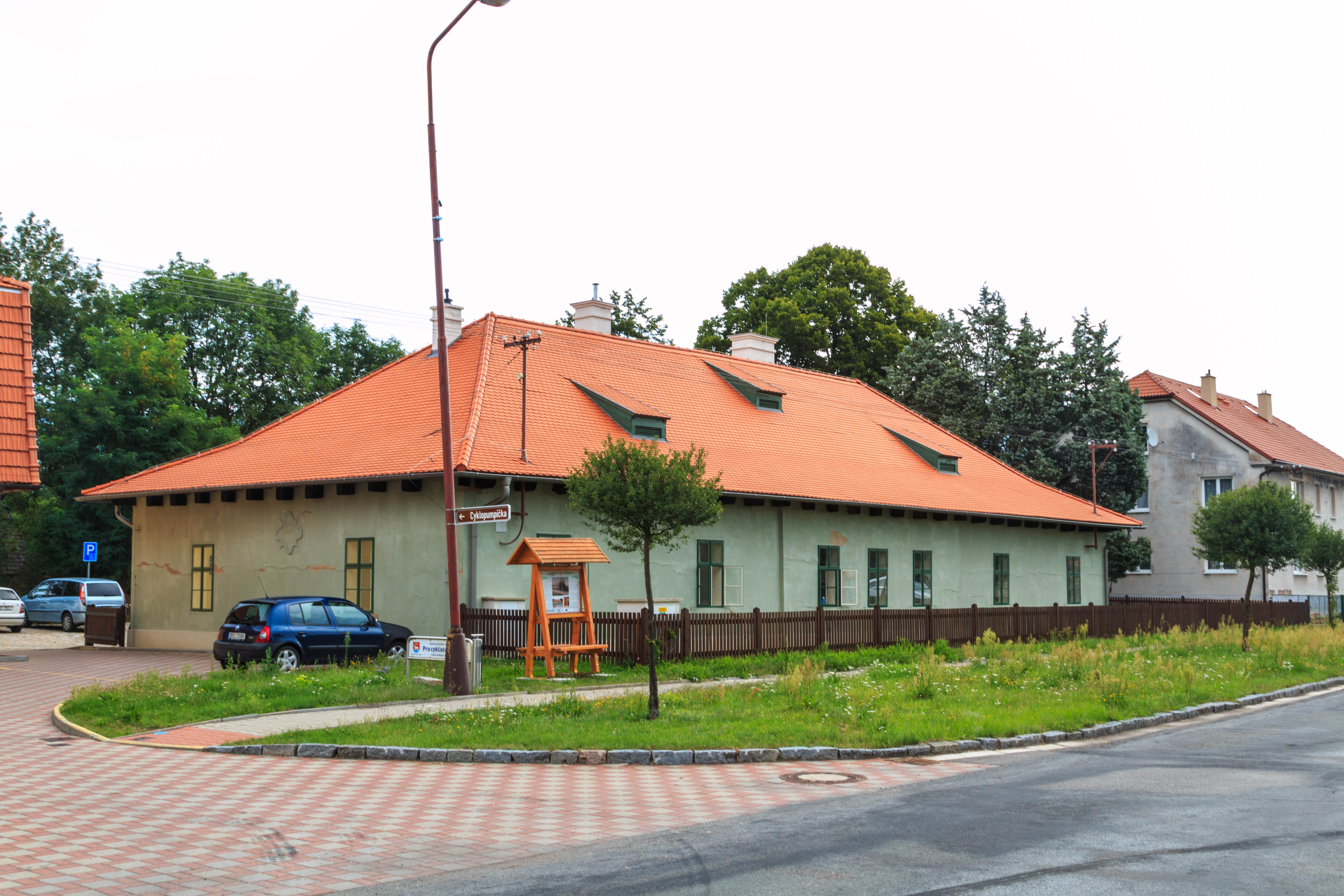 Myslivna, Kladruby nad Labem 20, Kladruby nad Labem.